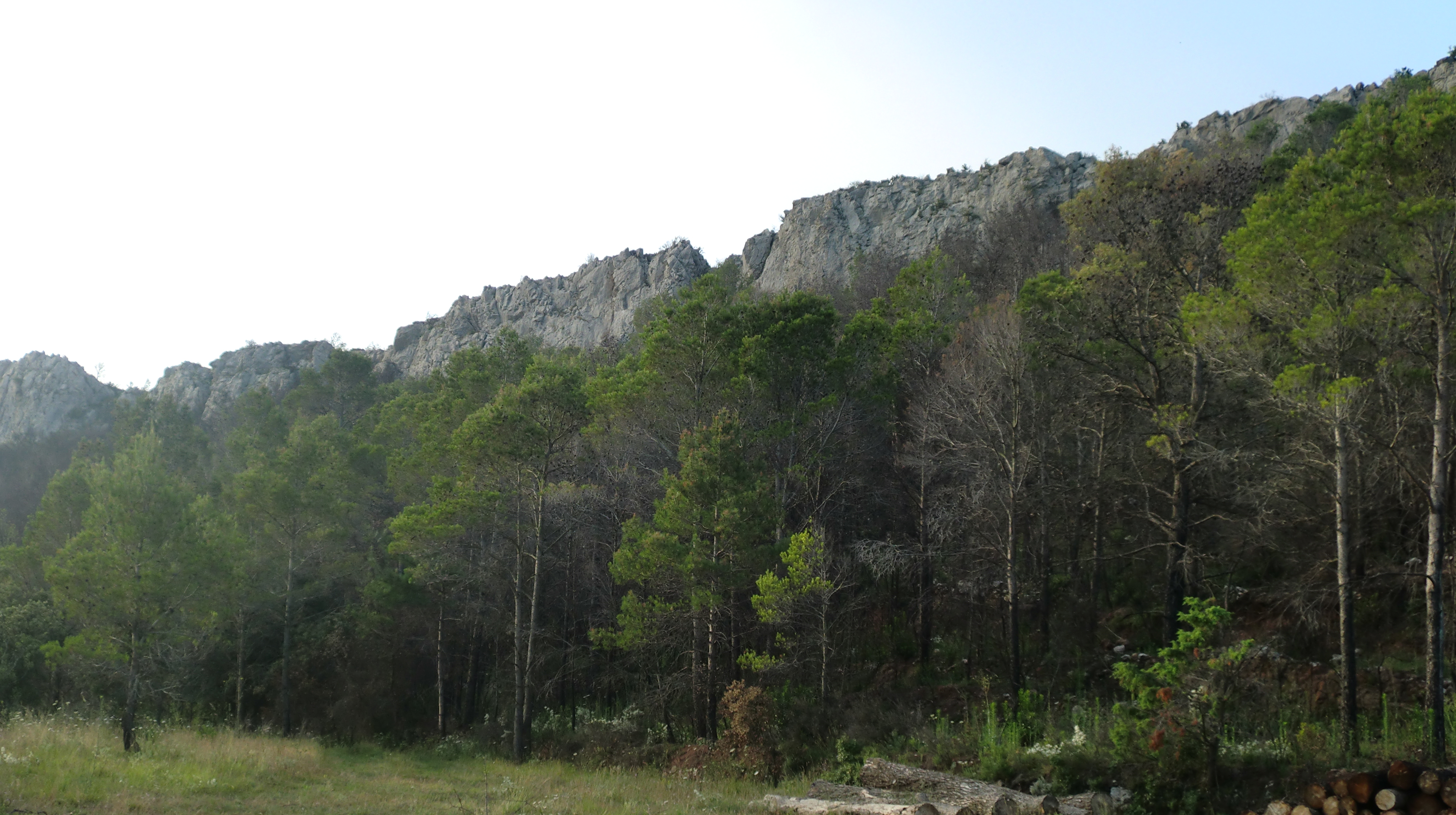 Serra situada al municipi de Terrades, a la comarca de l'Alt Empordà, amb una elevació màxima de 346 metres.